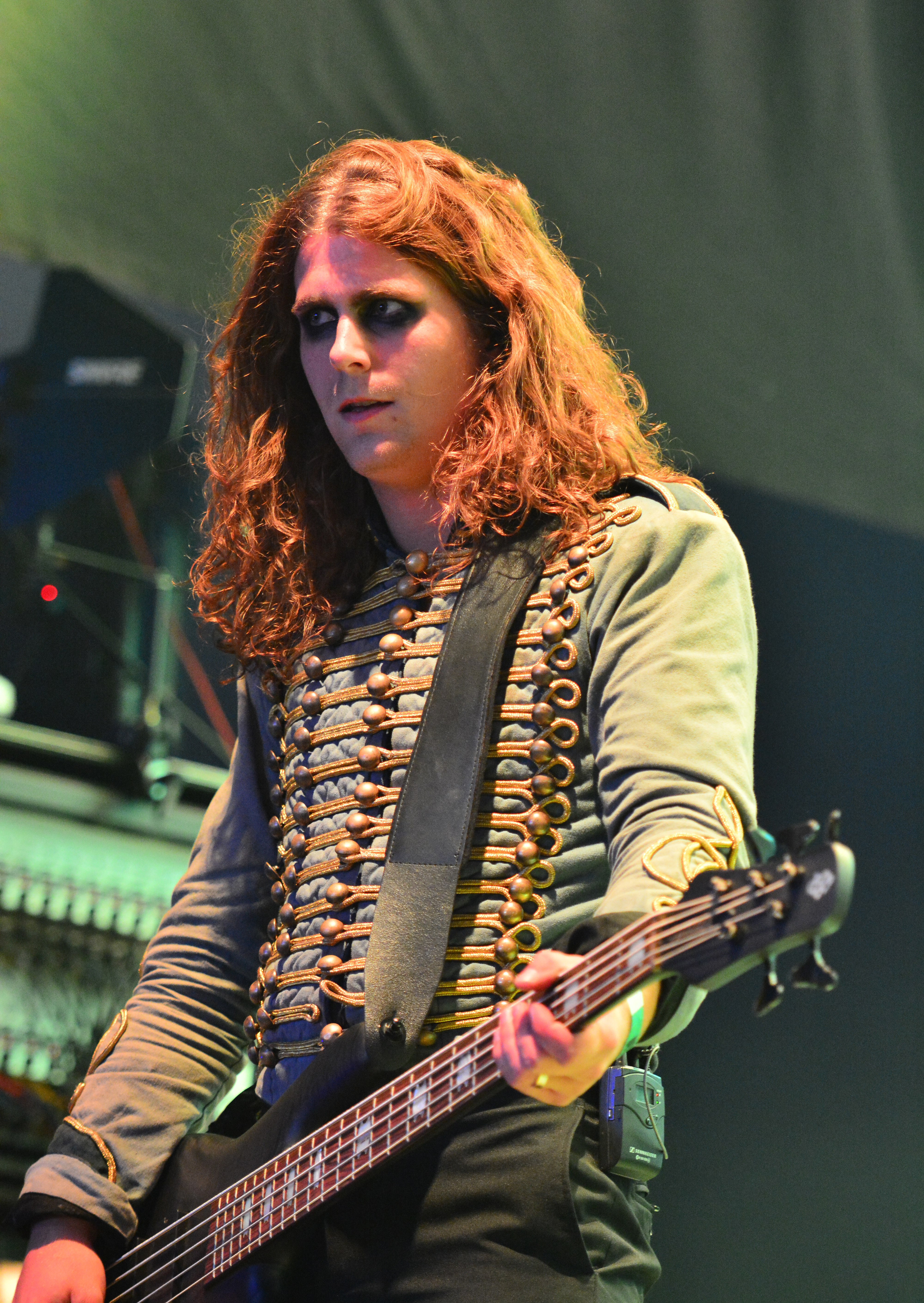 Avatar beim Wacken Open Air 2015